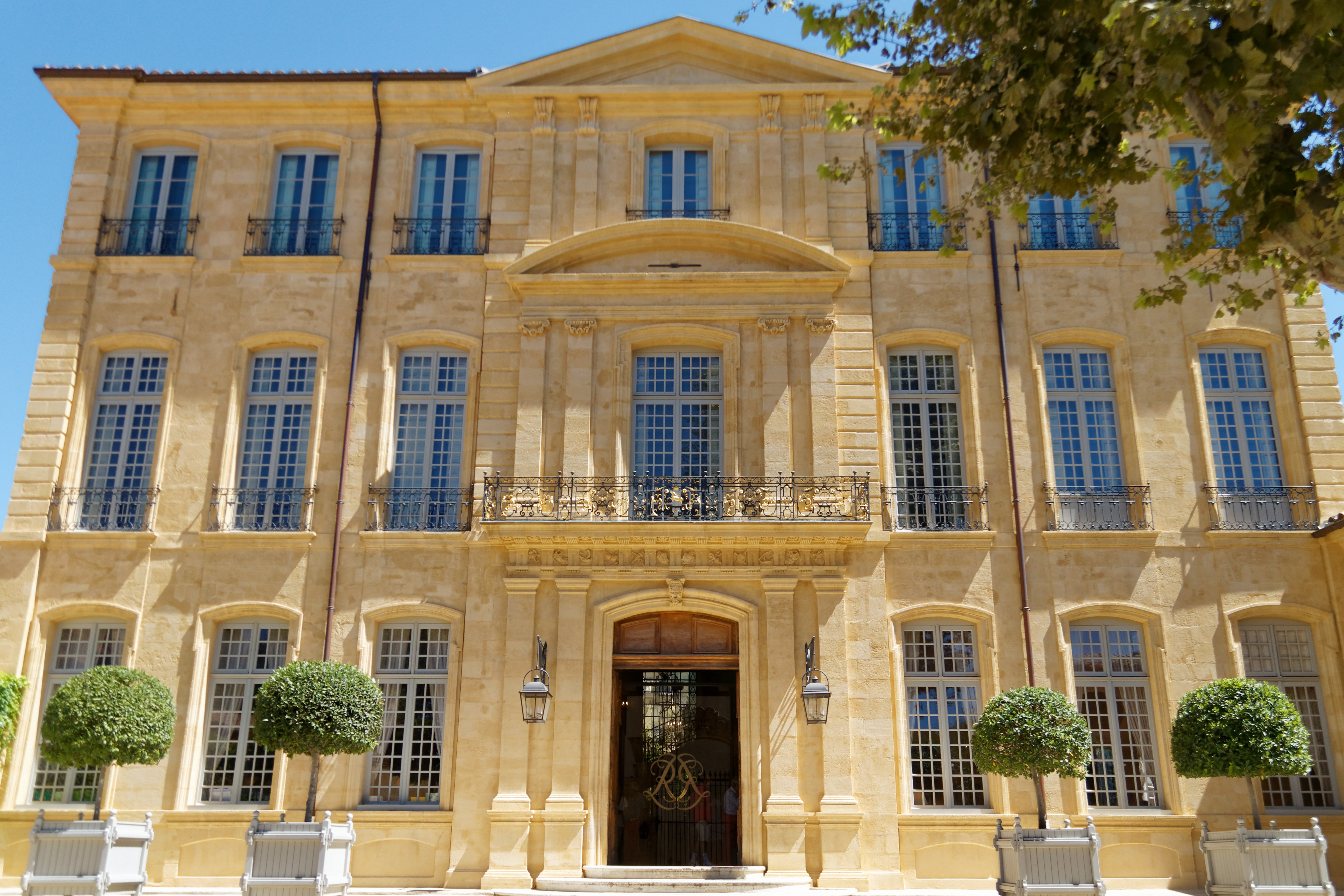 Hôtel de Caumont in Aix-en-Provence, Sitz des Caumont Centre d'Art